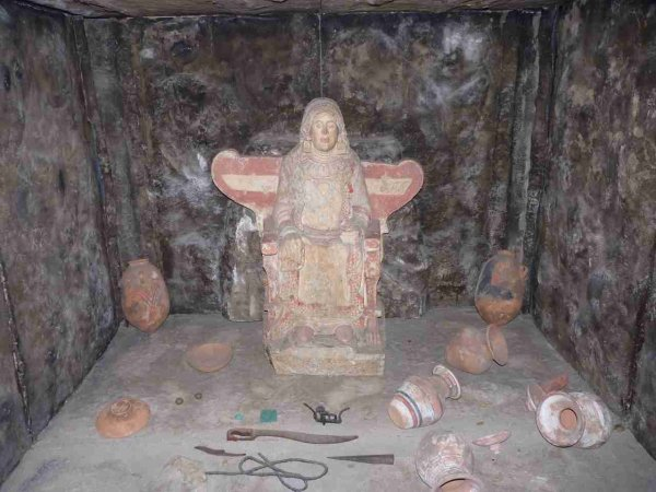 considerada como la mejor expresión del arte ibérico escultórico.